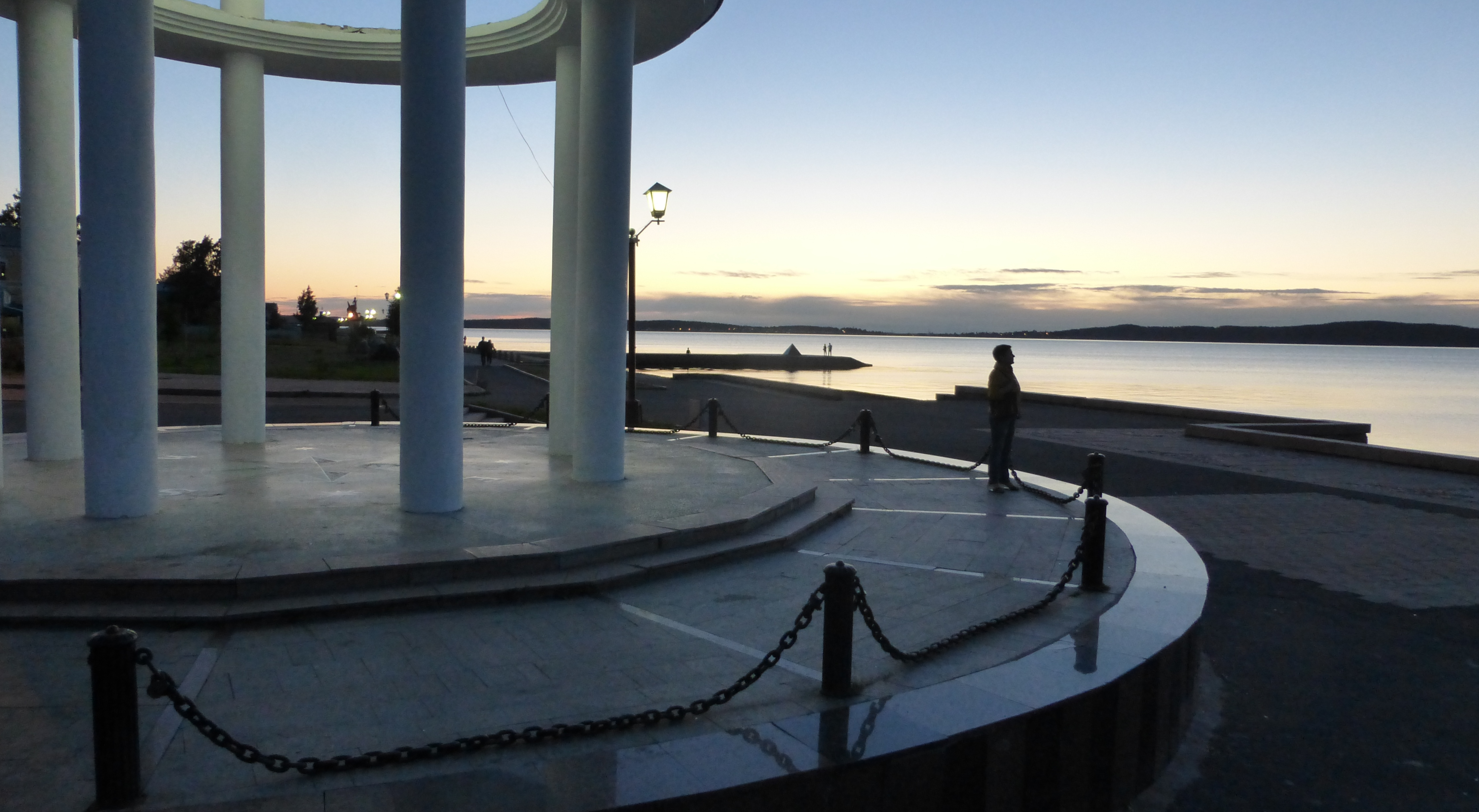 Белая ночь. Онежская набережная, Петрозаводск.